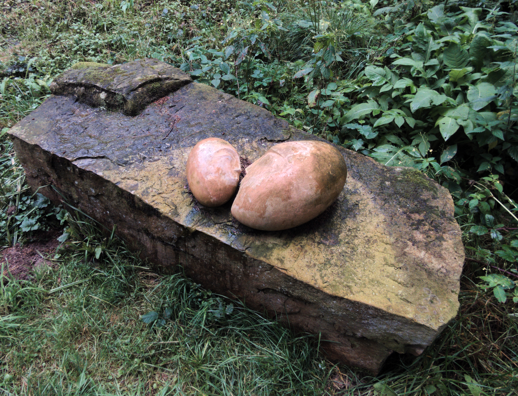 2015 realisiertes, von einer Schülerin eines Kunstleistungskurses der Leibnizschule entworfenes, Grabzeichen beim Waldfriedhof Nienstedt in Niedersachsen